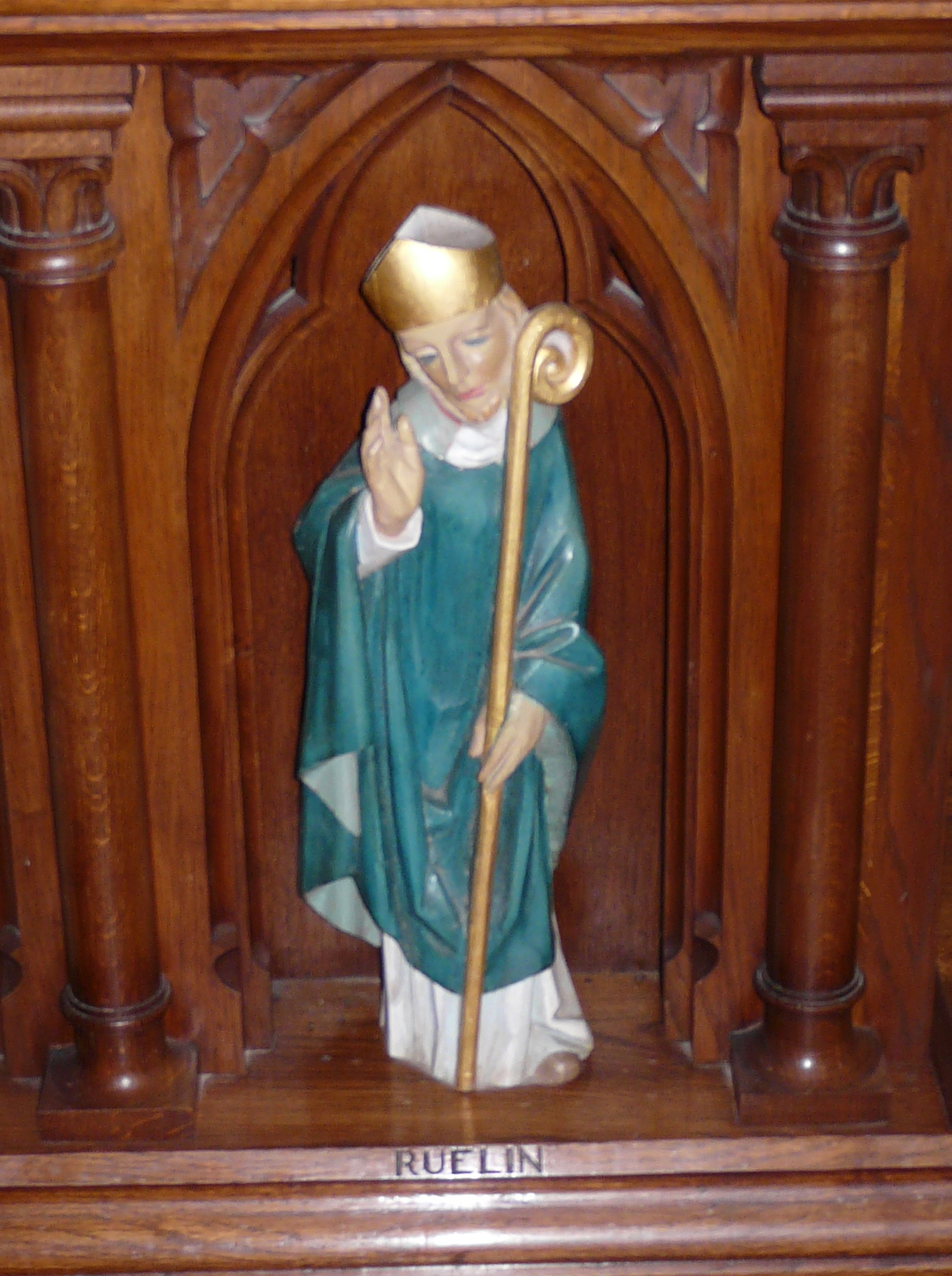 Un des saints ornant l'autel de l'église St Victor (La Grigonnais)